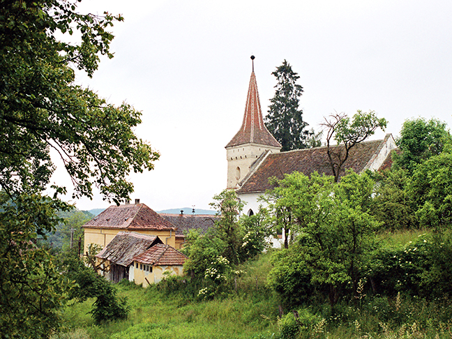 Kirche von Martinsdorf - Metiş